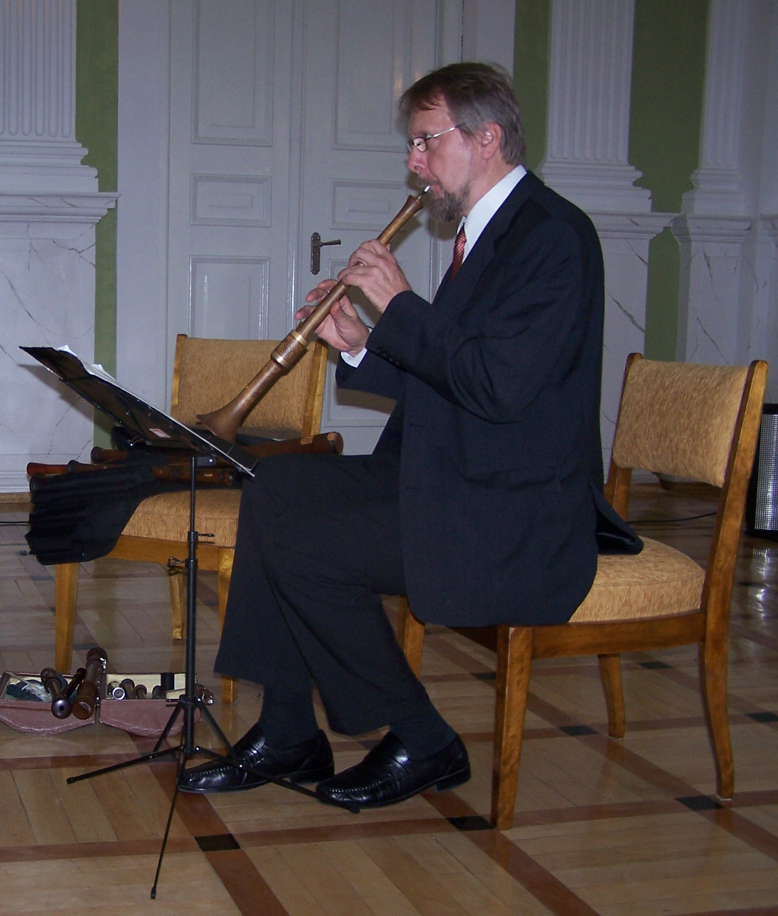 Przyjechał Kurpś do Warsiawy - zespół muzyki dawnej Ars NovaLider zespołu: Jacek Urbaniak